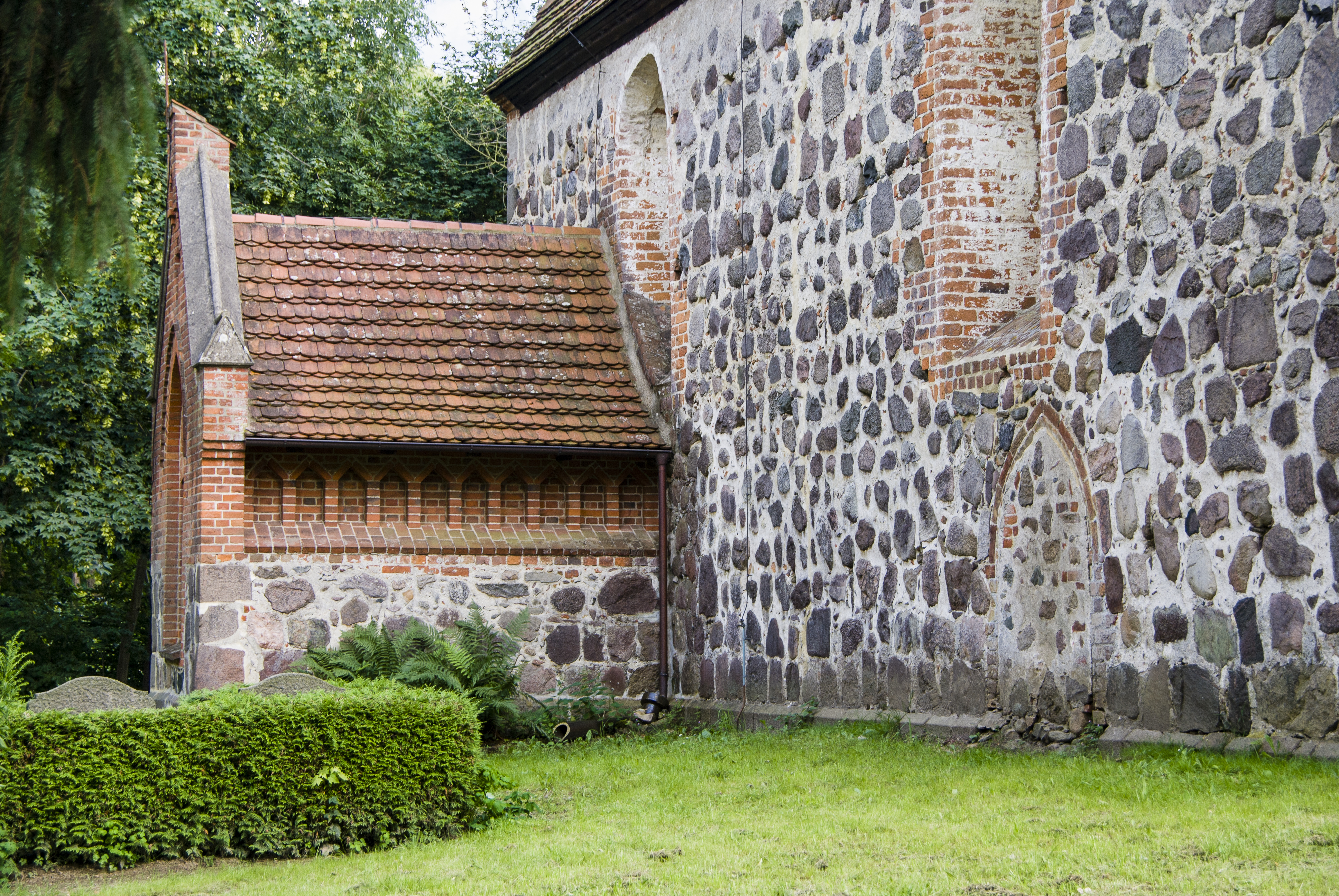 Dorfkirche Moisall - Südansicht